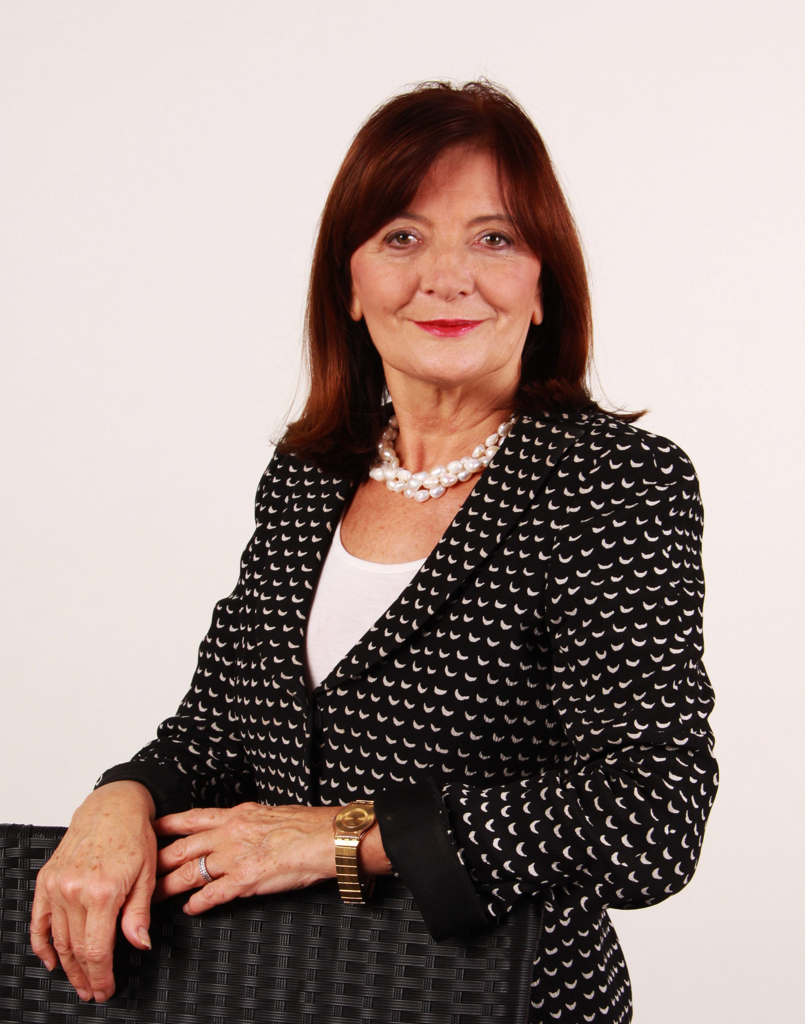 Abgeordnete/r Europaparlament